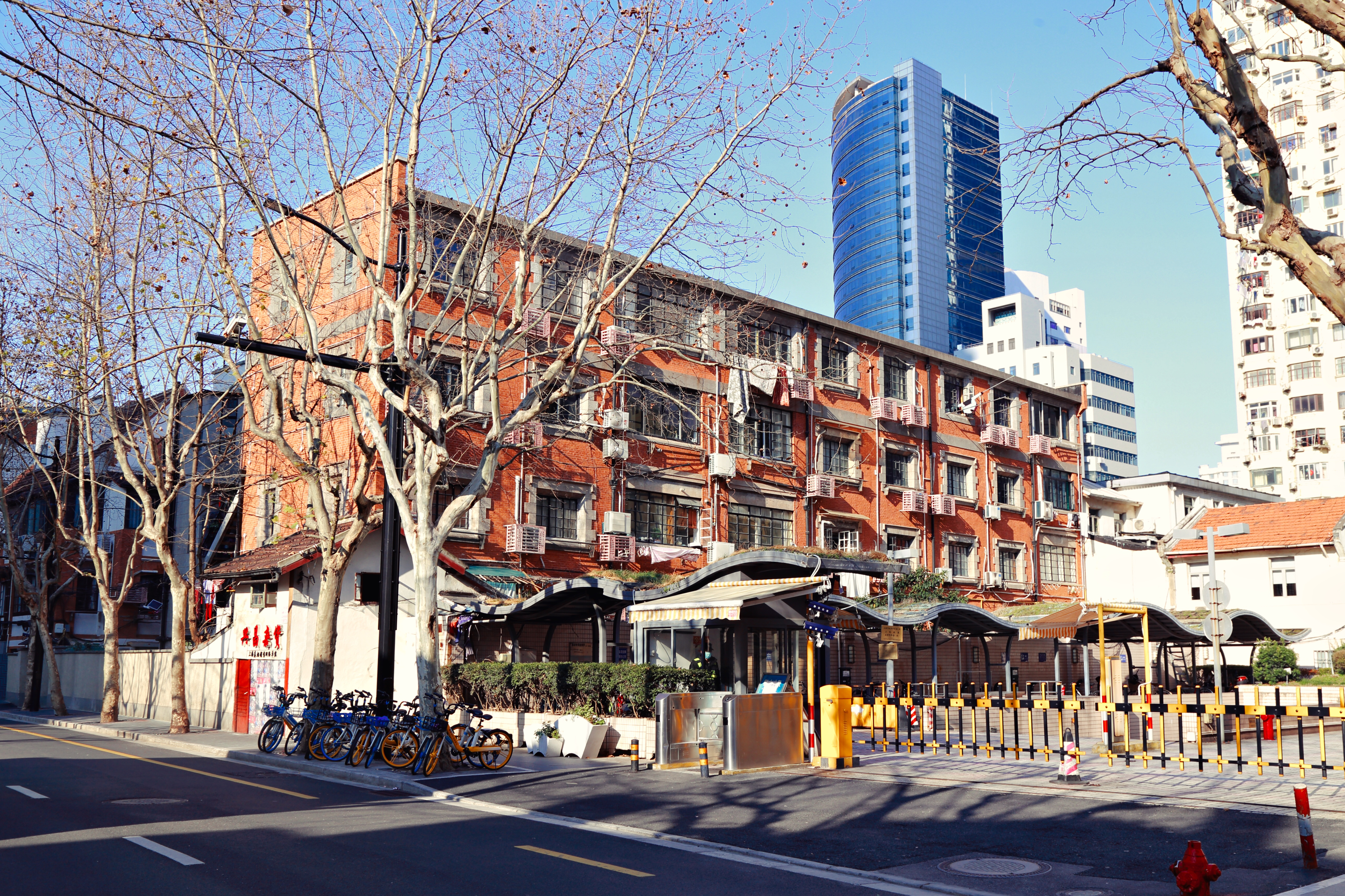 中文（中国大陆）: 皮裘公寓·上海